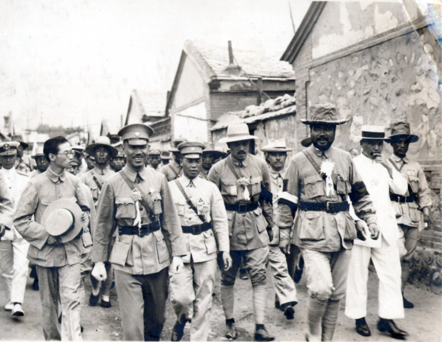 蒋介石と馮玉祥。